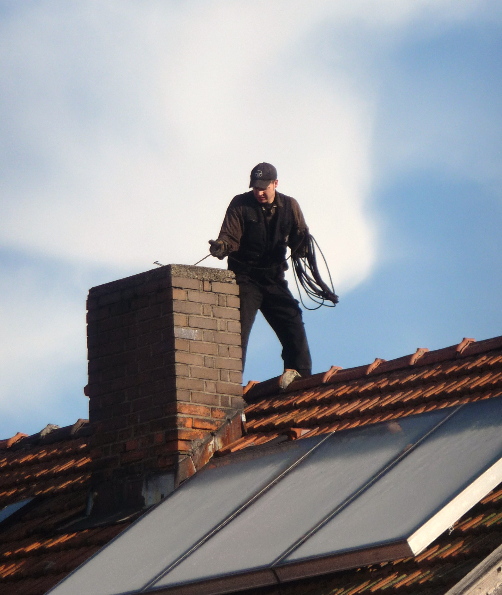 Ein Schornsteinfeger bei der Arbeit